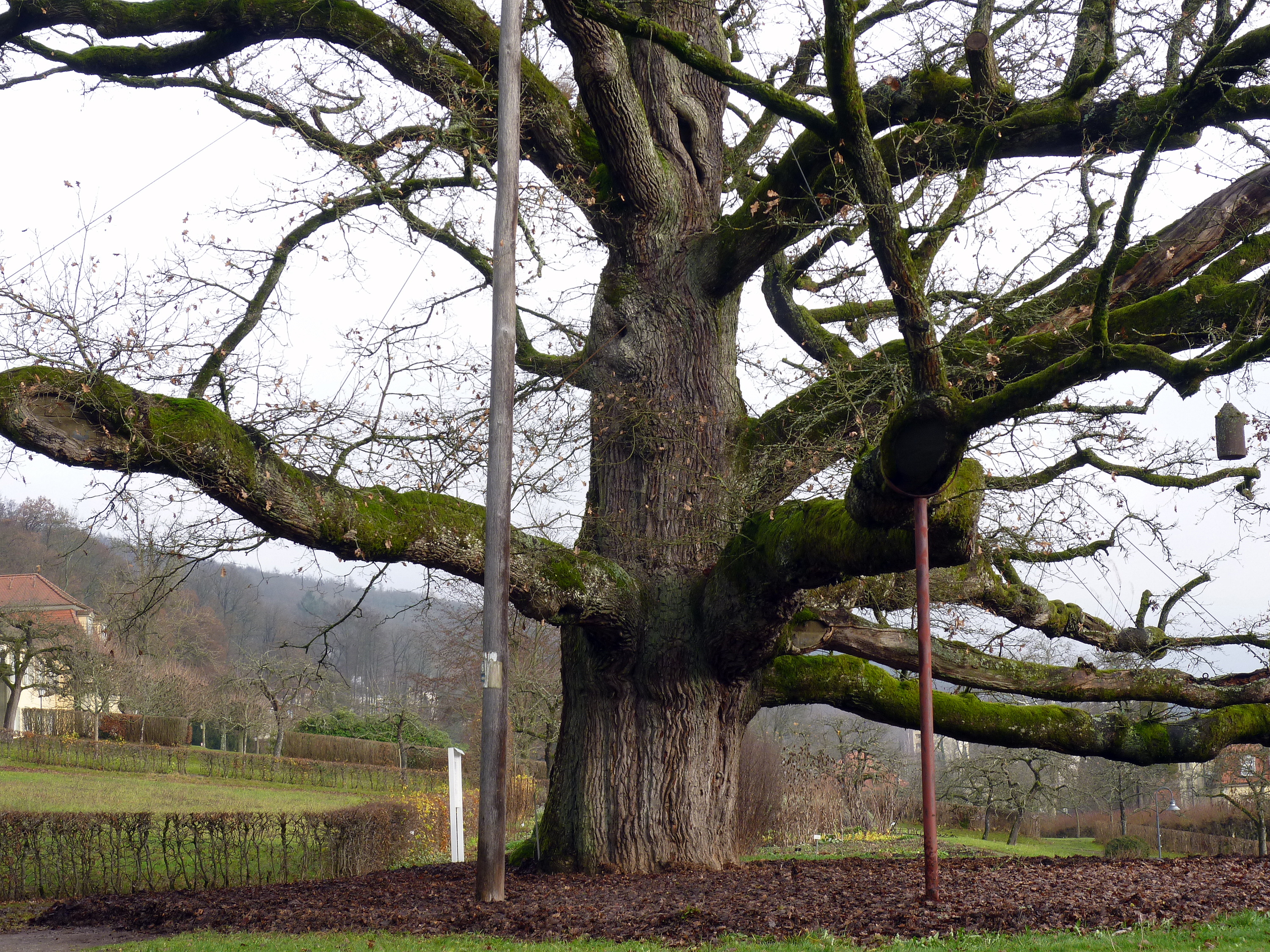 König-Ludwig-Eiche